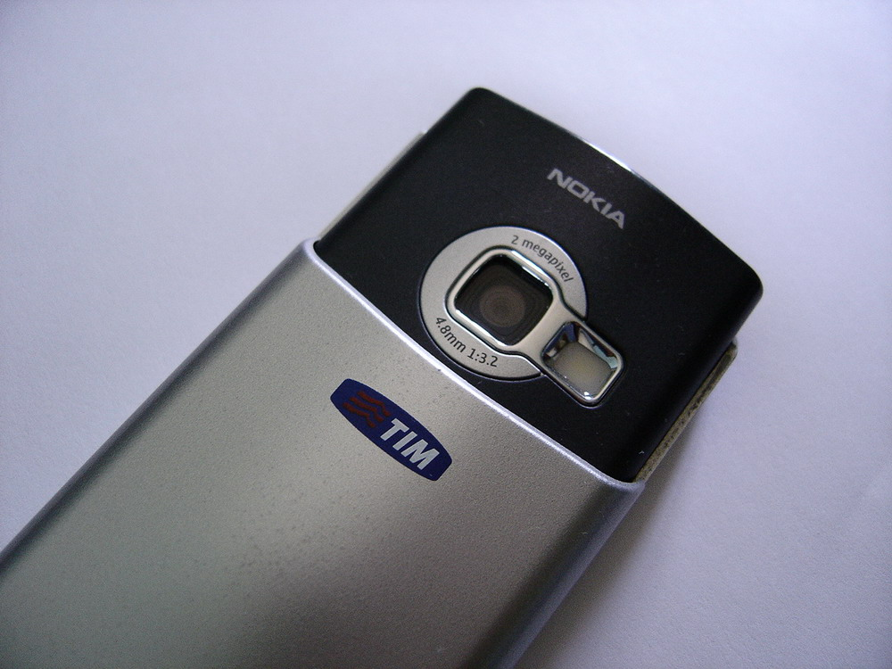 Vue arriere de Nokia N70